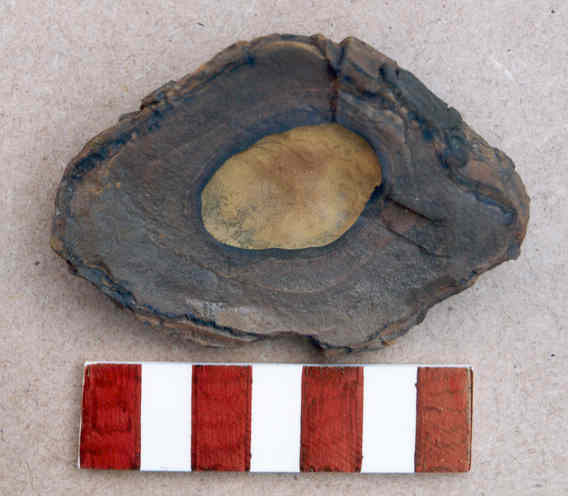 Doorsnede van een klappersteen. De leemkern met eromheen de opbouw van ijzererts is goed te zien.